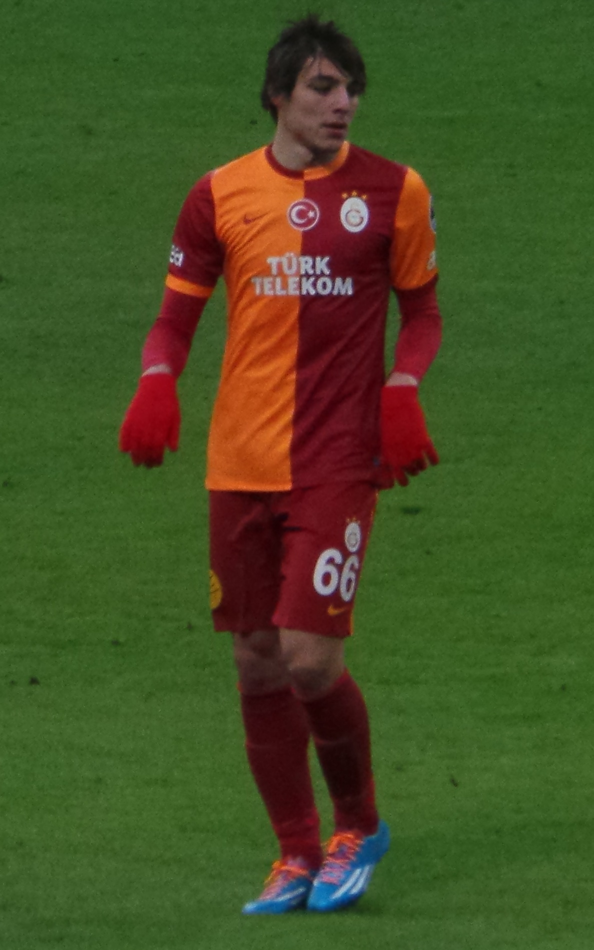 Salih with Galatasaray